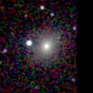 Galaxy NGC 6